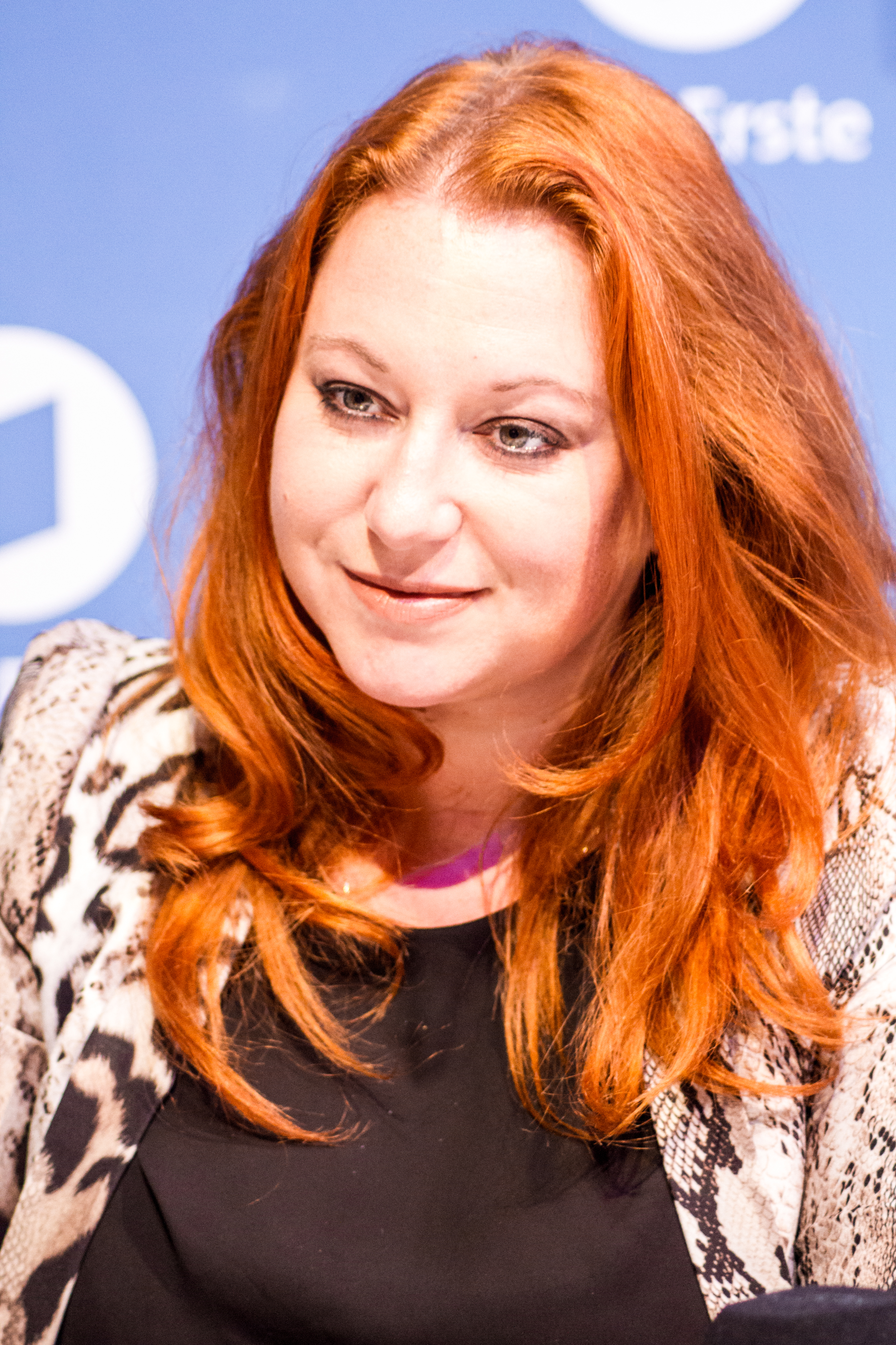 Rebecca Siemoneit-Barum am Stand des ZDF auf der Internationale Funkausstellung 2015.